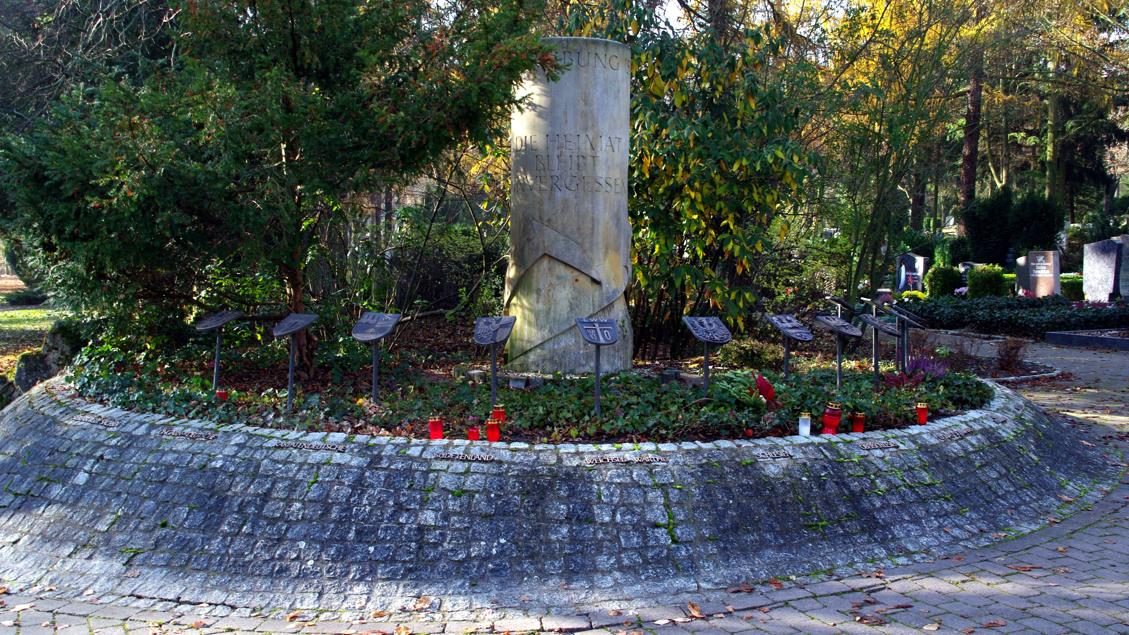 Vertriebenendenkmal auf dem Erfurter Hauptfriedhof.